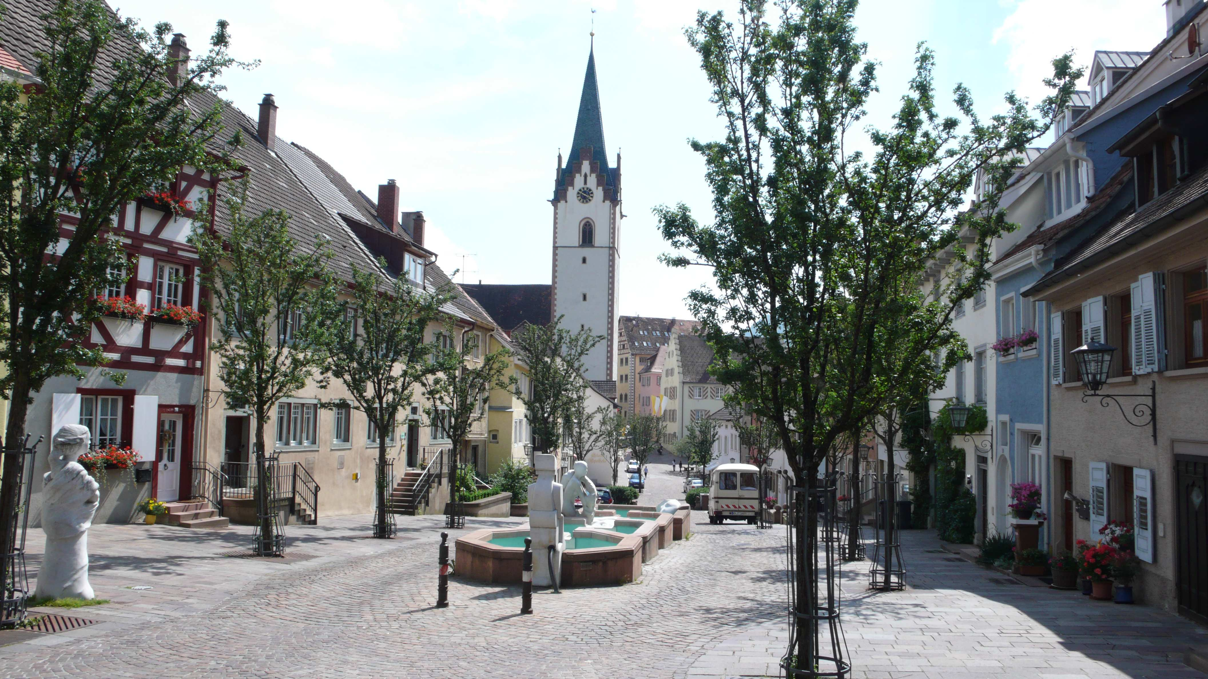 Engen, Germany, Altstadt